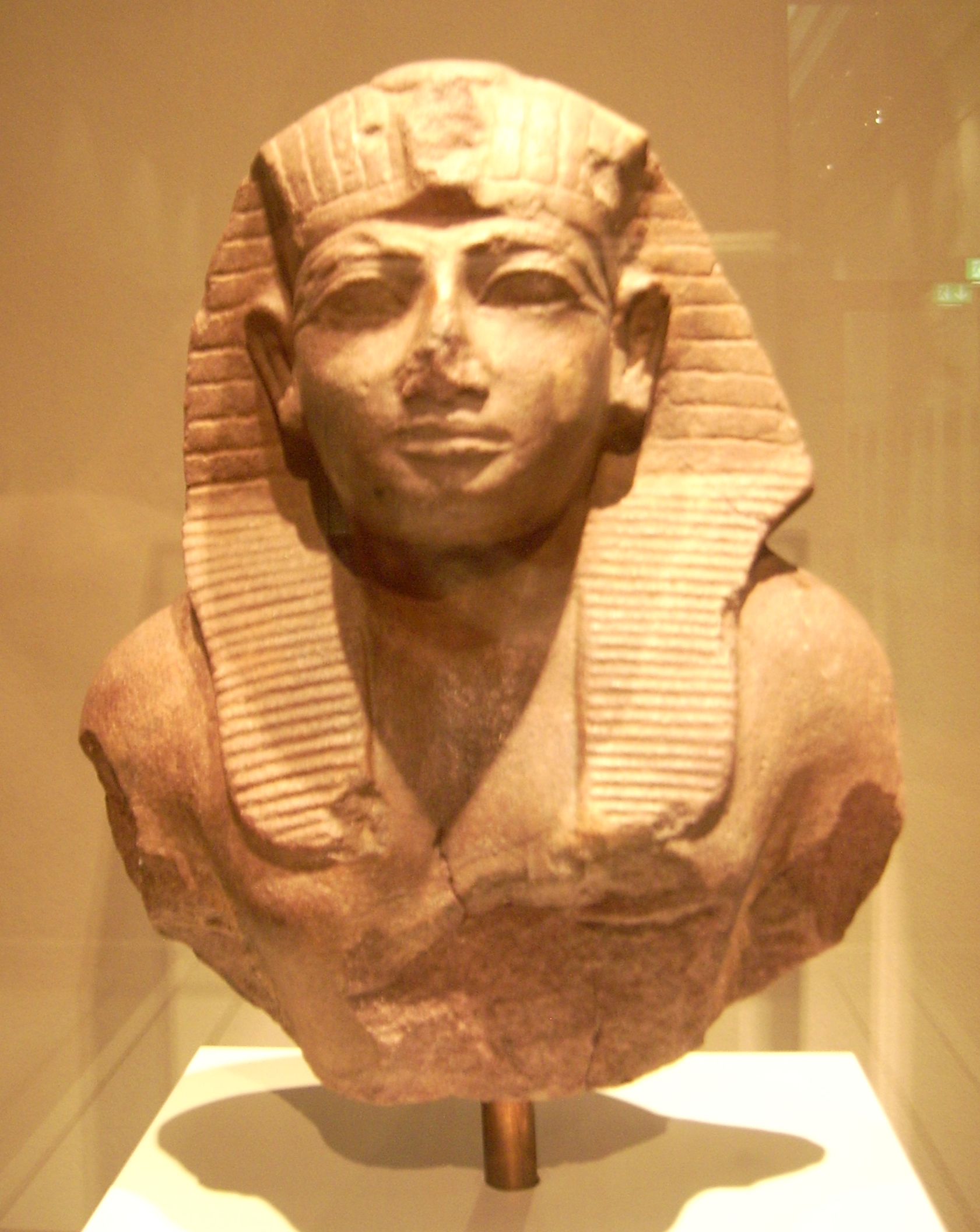 Büste Amenophis II.; Neues Reich, 18. Dynastie, um 1825 v. Chr.; Wad Ban Naga (Sudan); Quarzit; Ägyptisches Museum/Altes Museum, Inv.-Nr. 2057